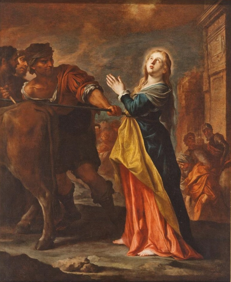 La obra representa a la mártir Santa Lucía preparándose para acudir al suplicio.